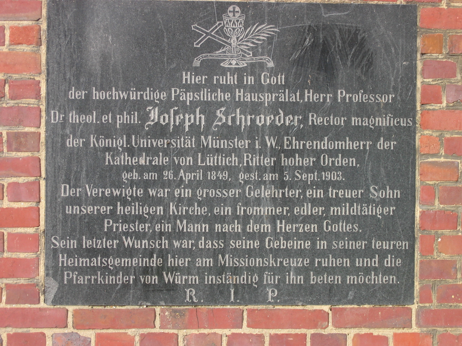 Joseph Schroeder, Gedenkstein an der Pfarrkirche zu Würm (Geilenkirchen) Hier ruht in Gott der hochwürdige Päpstliche Hausprälat, Herr Professor Dr theol. et phil. Joseph Schroeder, Rector magnificus der Königl. Universität Münster i. W., Ehrendomherr der Kathedrale von Lüttich, Ritter hoher Orden, geb. am 26. April 1849, gest. am 5. Sept. 1903. Der Verewigte war ein grosser Gelehrter, ein treuer Sohn unserer heiligen Kirche, ein frommer, edler, mildtätiger Priester, ein Mann nach dem Herzen Gottes. Sein letzter Wunsch war, dass seine Gebeine in seiner teuren Heimatsgemeinde hier am Missionskreuze ruhen und die Pfarrkinder von Würm inständig für ihn beten möchten. R. I. P.